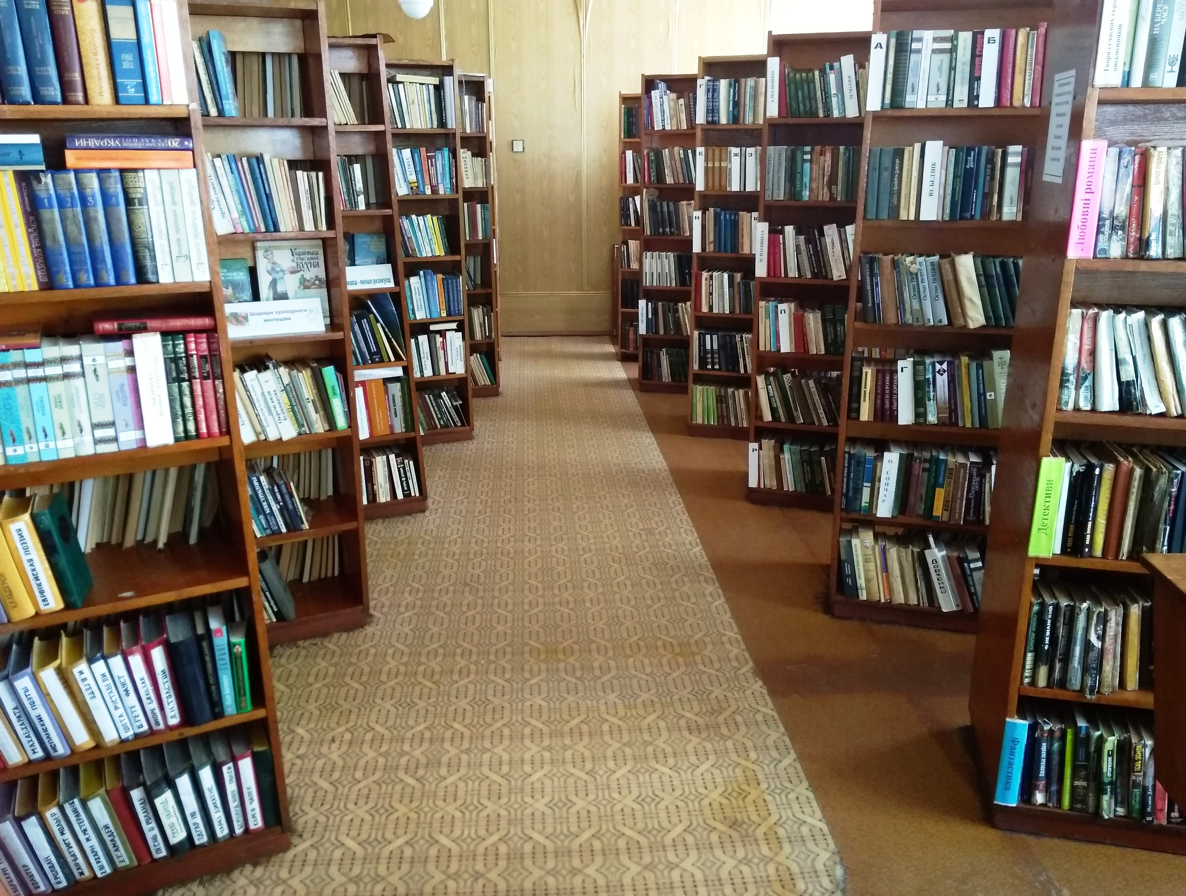 приміщення